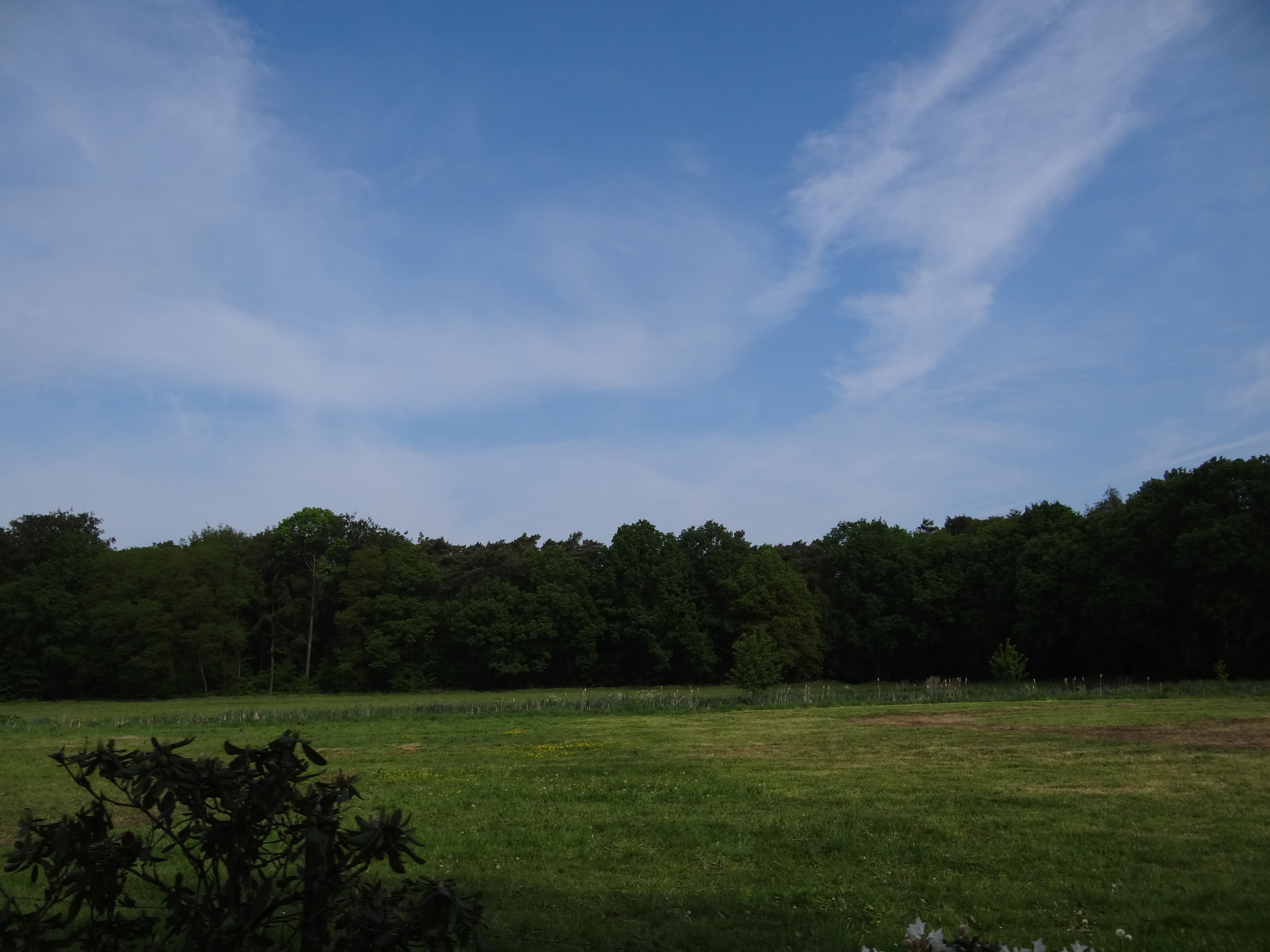 Hagen of De Kelder, Kruisbergse bossen